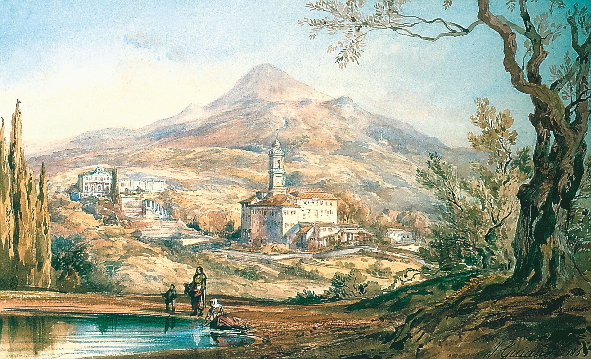 Le monastère et la villa Arson à Saint-Barthélémy, 1855, Jacques GUIAUD (Aquarelle 16cm x 26,5cm)